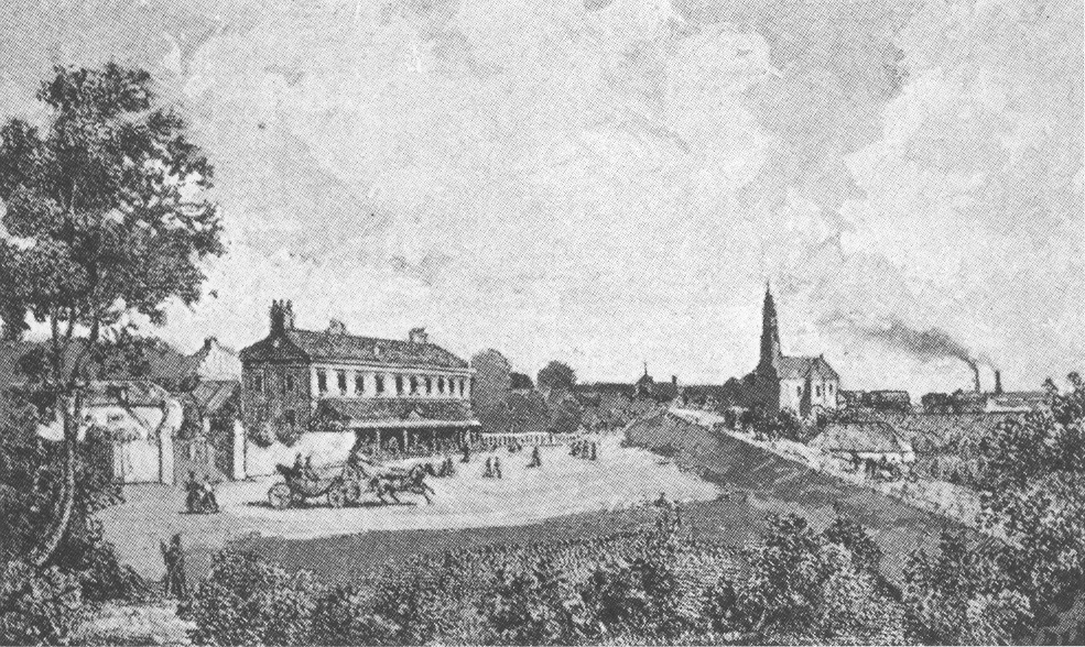 Zwischenbrücken (Vienna), Geusthouse "Zu den drei Alliierten"